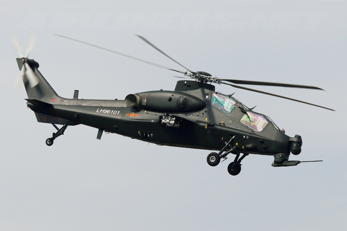 Changhe WZ-10 immatriculé LH96101 de l'armée de terre chinoise